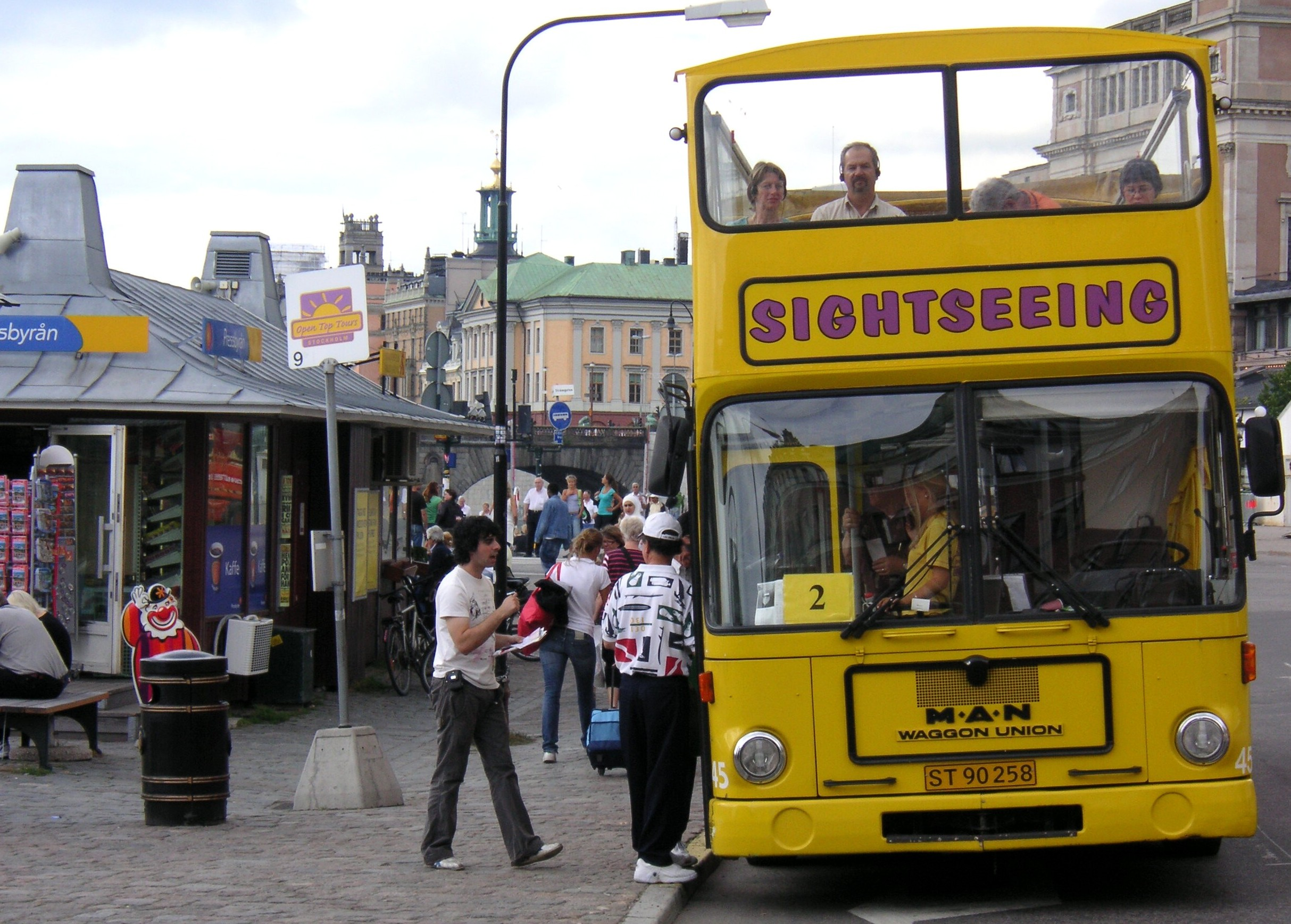 Sightseeingbuss i Stockholm, Blasieholmen